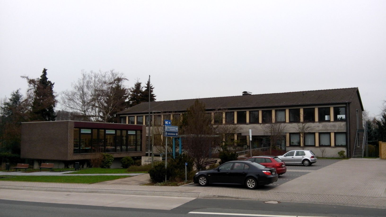 Bezirksamt des Bezirks Dornberg in Bielefeld.